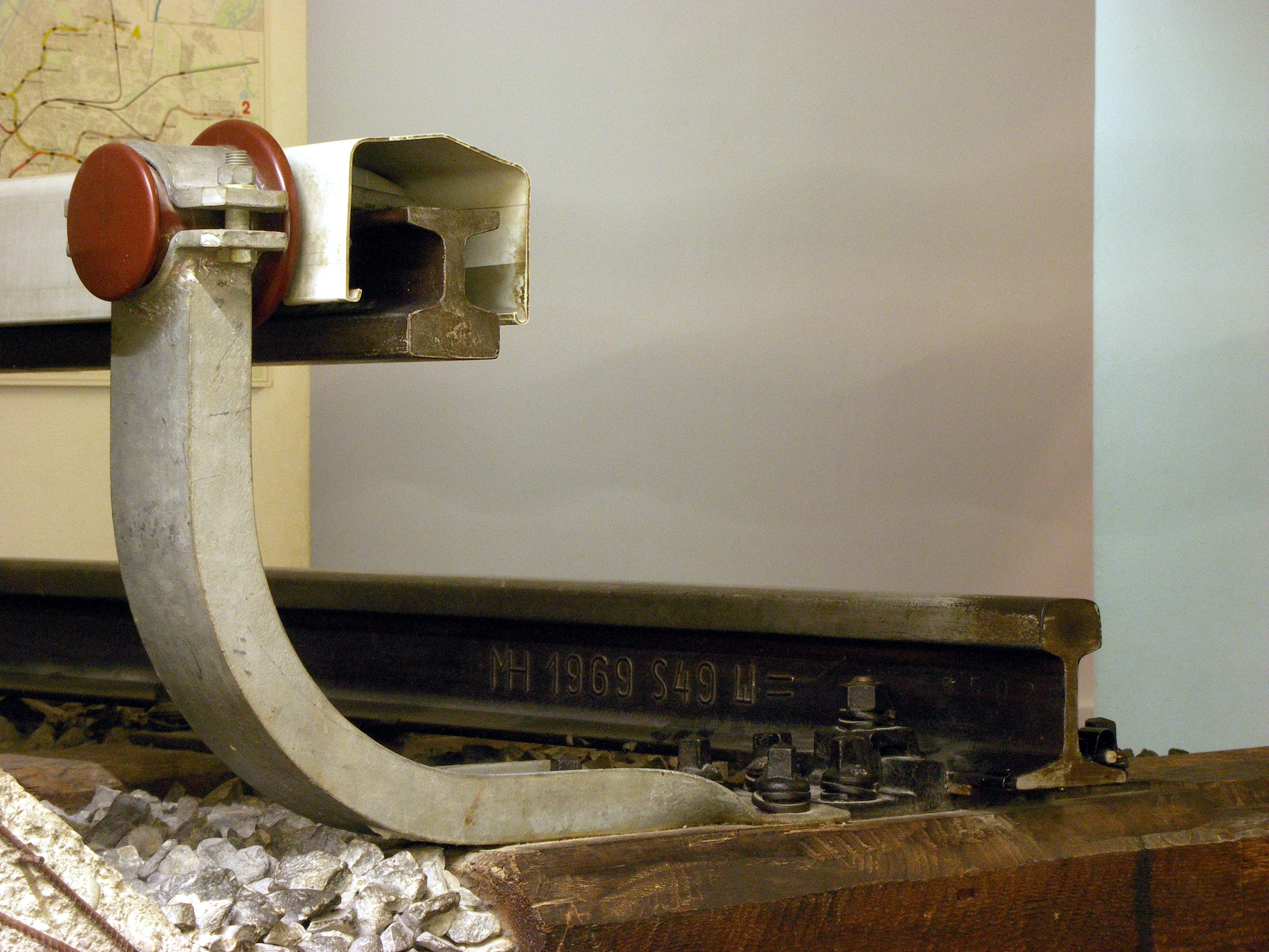 Stromschiene (links) mit nach unten offener Schutzabdeckung und daneben eine der Fahrschienen (rechts), Querschnitt am Beispiel der Münchner U-Bahn, aufgenommen im Deutschen Museum in München